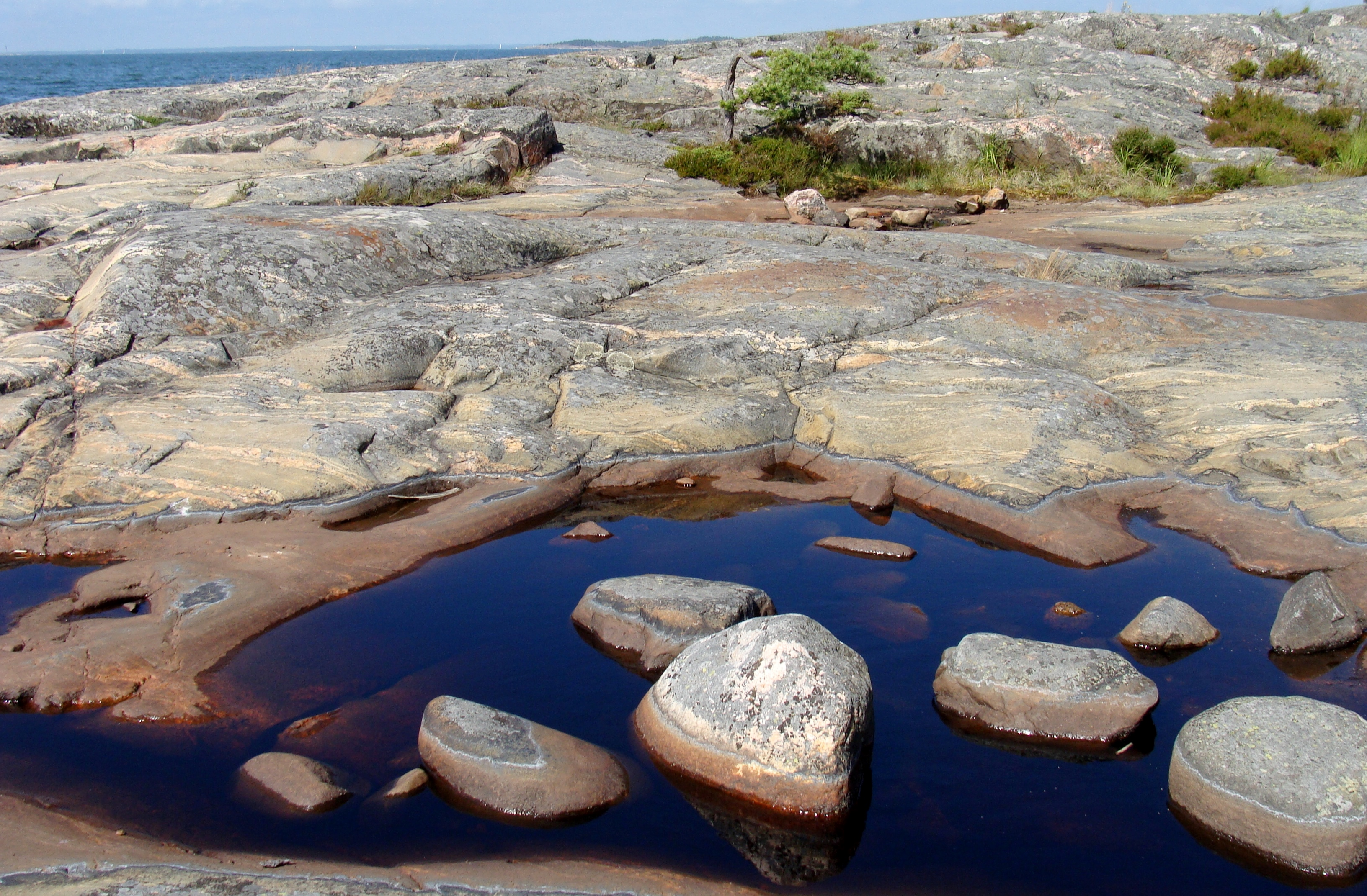 Porkkalanniemen kallioita